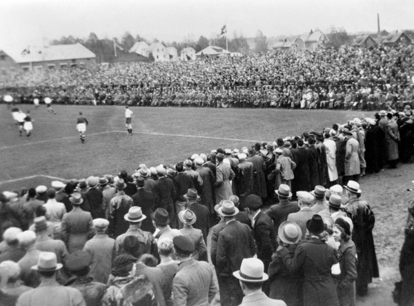 1938 Norwegian Football Cup Final between Fredrikstad FK and Mjølndalen IF at Briskeby gressbane, Hamar